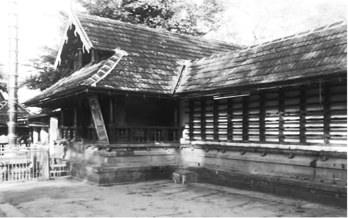 തിരുമാന്ധാംകുന്ന് ക്ഷേത്രം